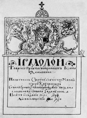 Супрасльский Ирмологион. 1596–1601 гг. Титульный лист (НБУВ ИР. Ф. 1. № 5391)